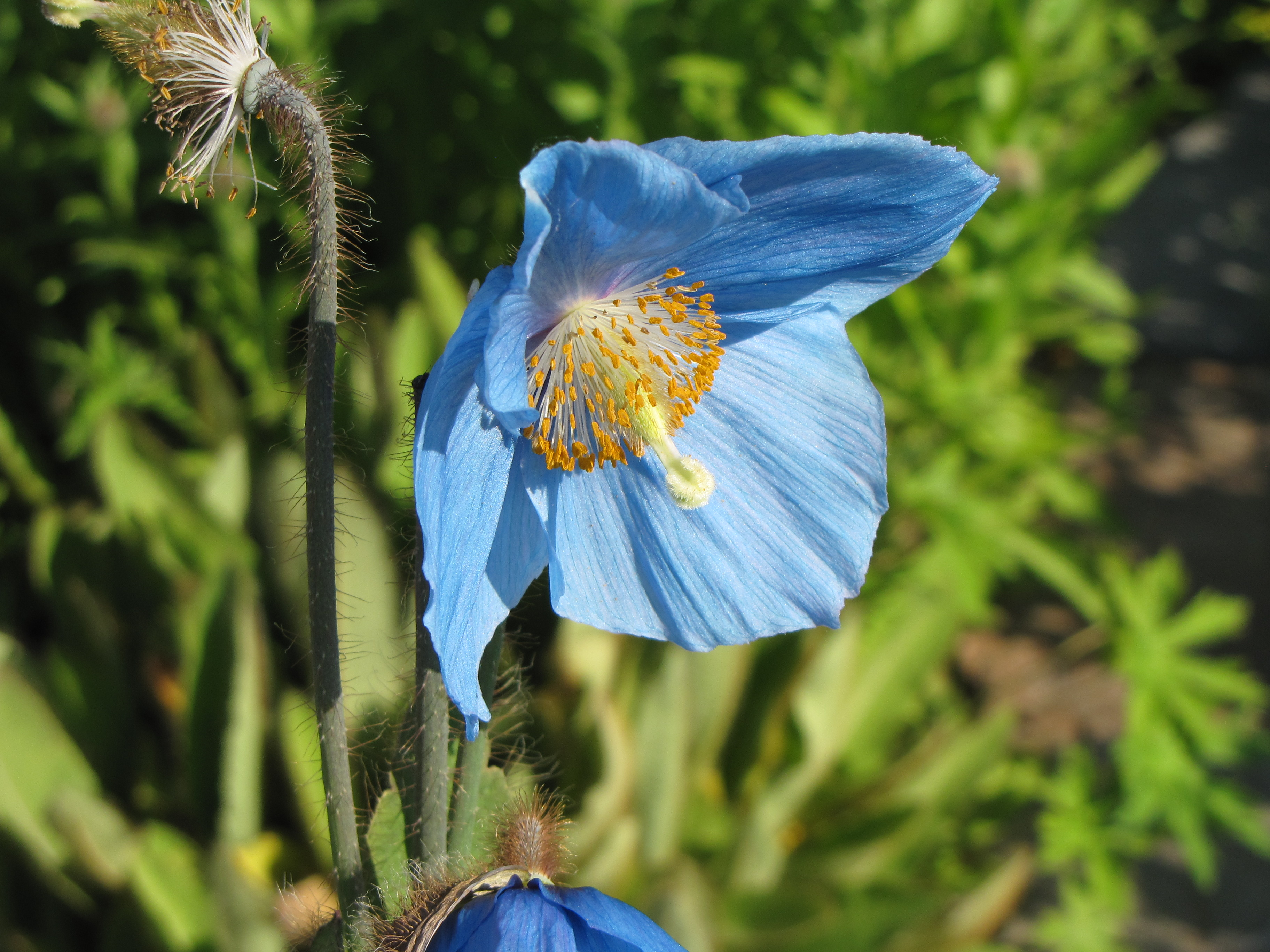 Blå bergvallmo.